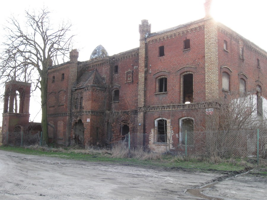 Pałac w Rybitwach